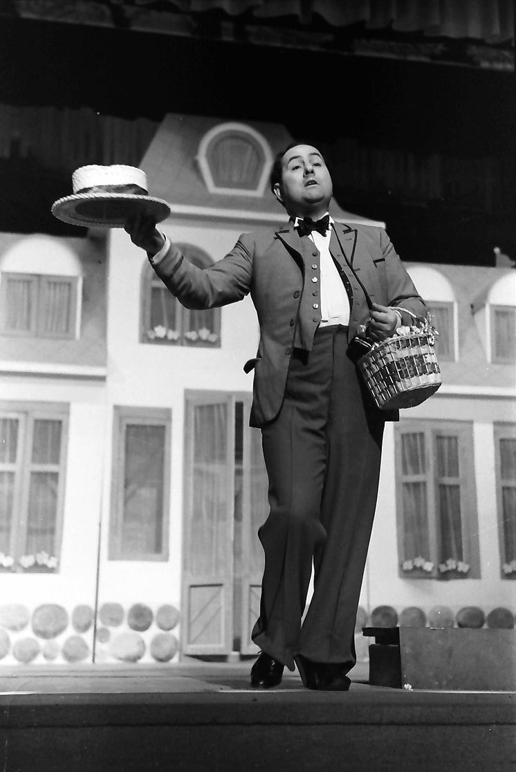 Kabarett der Komiker: Robert Dorsay als Graf von Laubackenheim